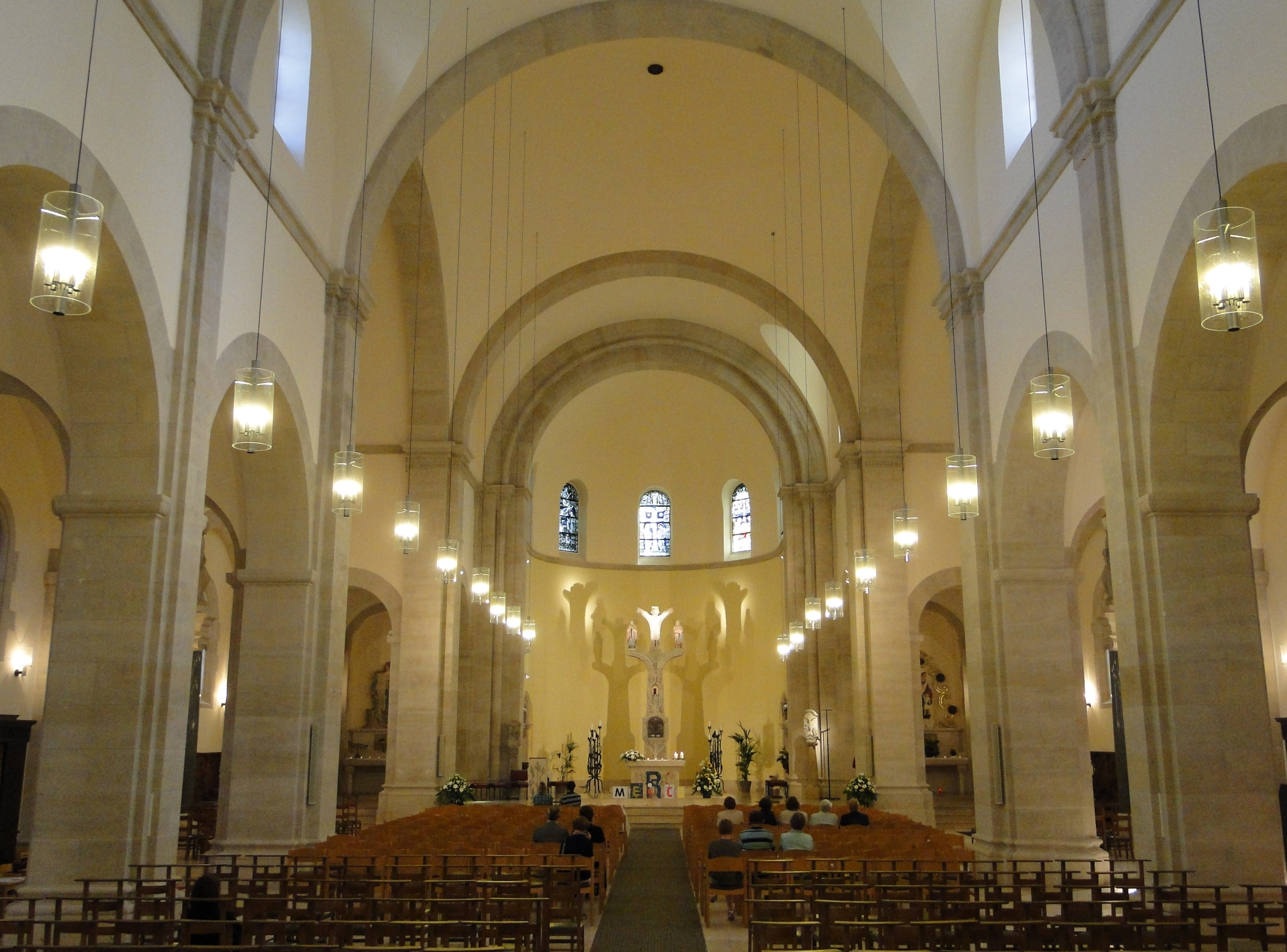 Jousefskierch um Lampertsbierg